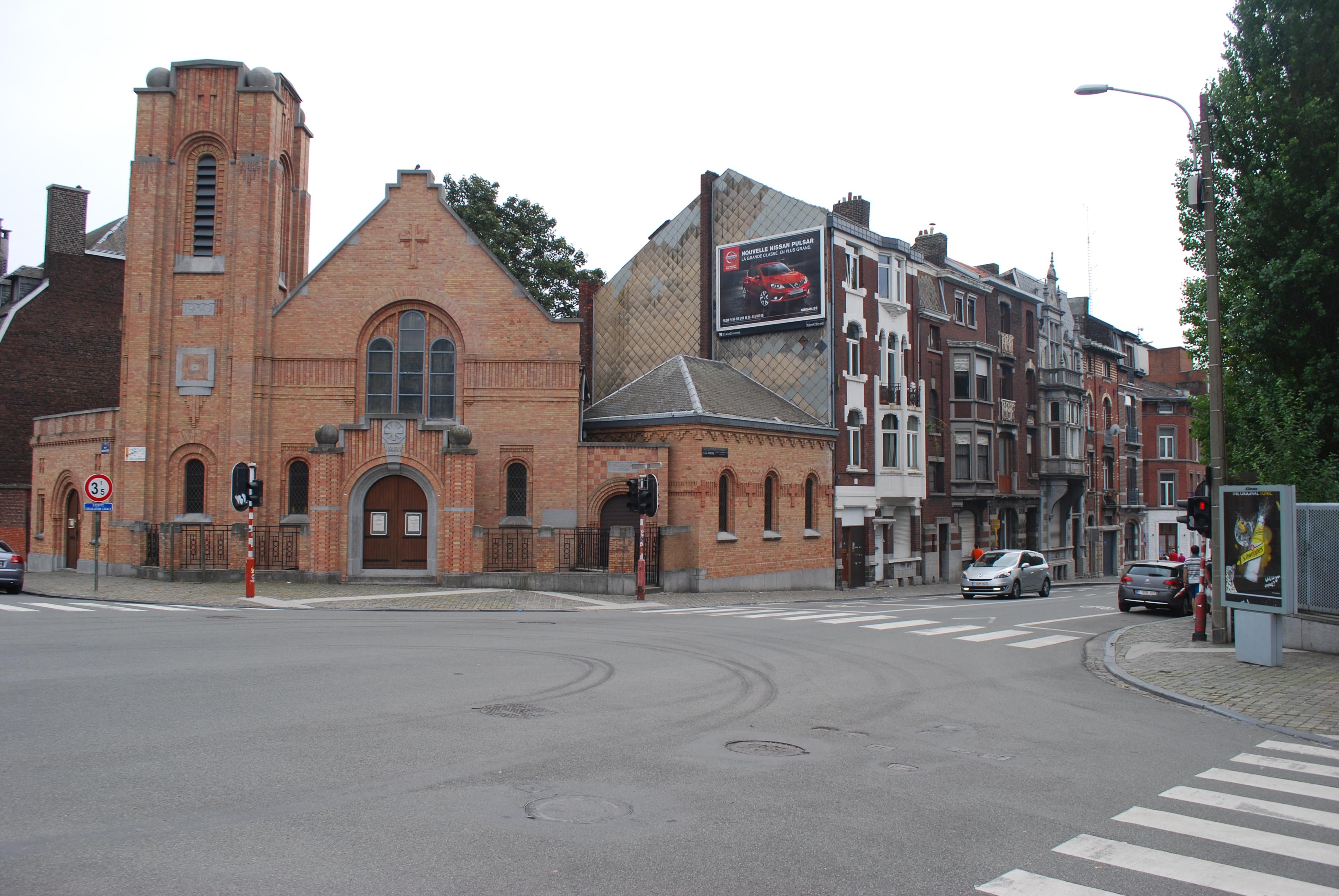 Vue de Liège.